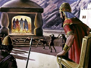 babilonia fornalha ardente